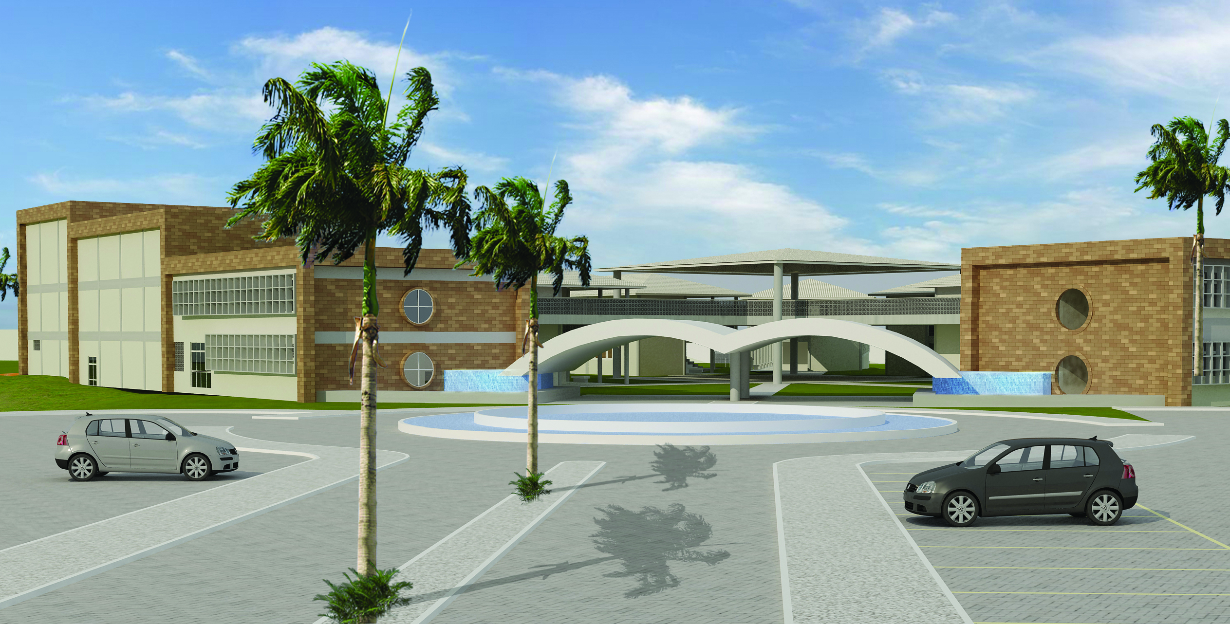 Maquete da fachada do IFCE campus de Canindé.